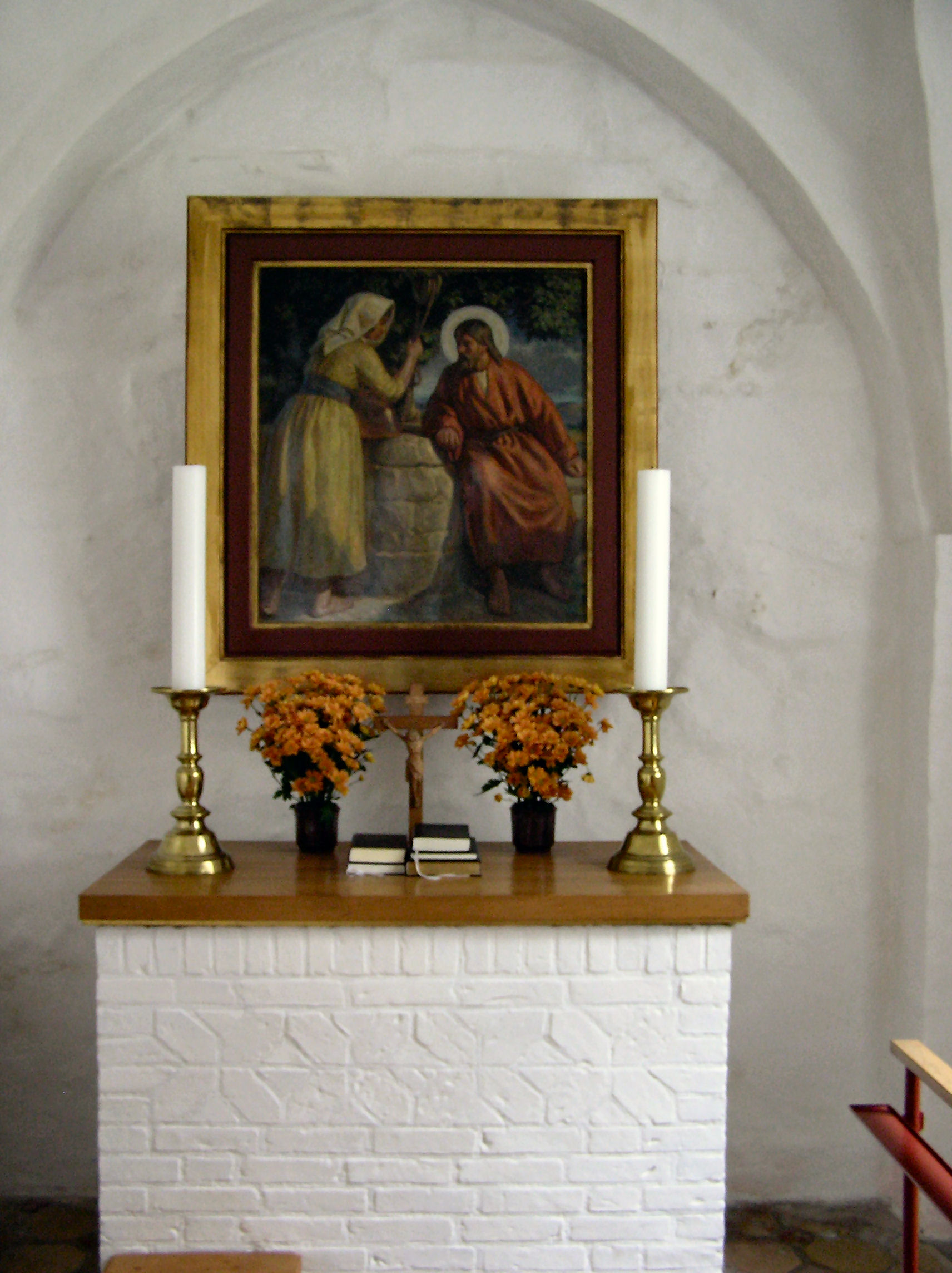 Ulsted Kirke,Aalborg Stift